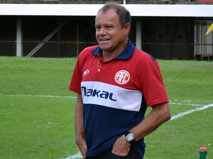 Foto do ex-jogador de futebol e atual treinador Arturzinho.